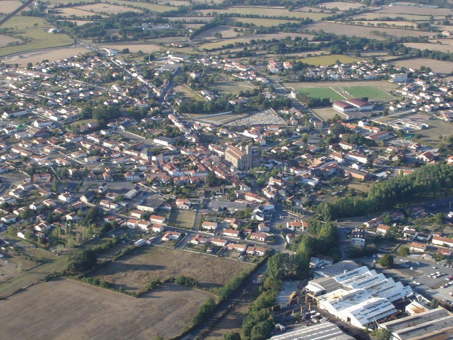 La Bruffière vu du ciel